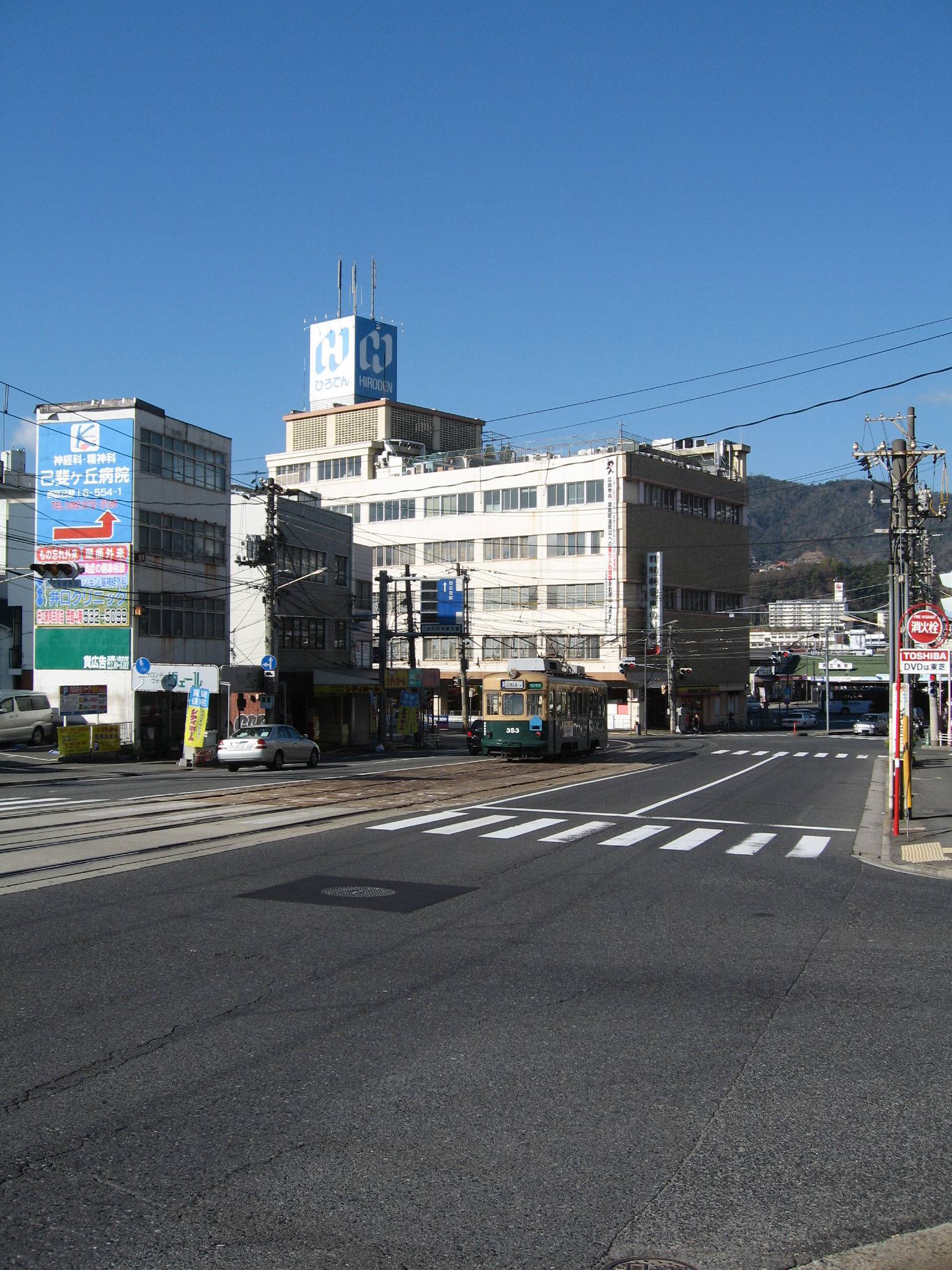 Hiroden-Kaikan Building in Hiroshima seen from Shin-Koi-Bashi Bridge